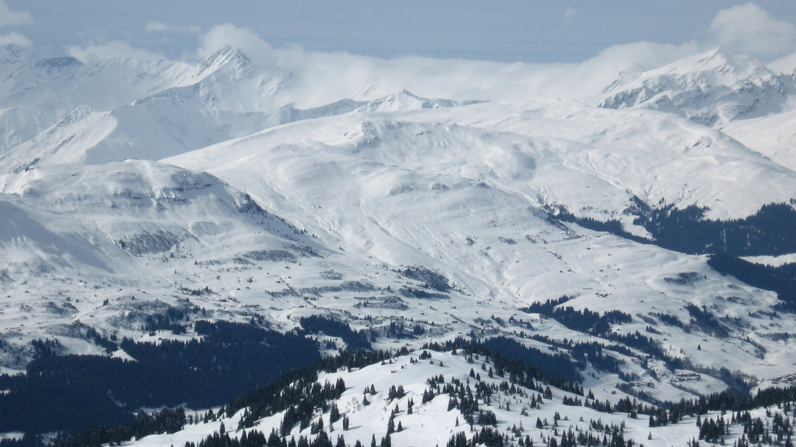 Piz Sezner auf dem breiten Rücken. Links der Piz Mundaun, halb in den Wolken versteckt der Piz Terri